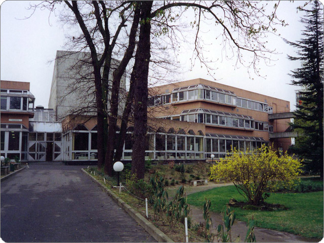 Batîment Galilée